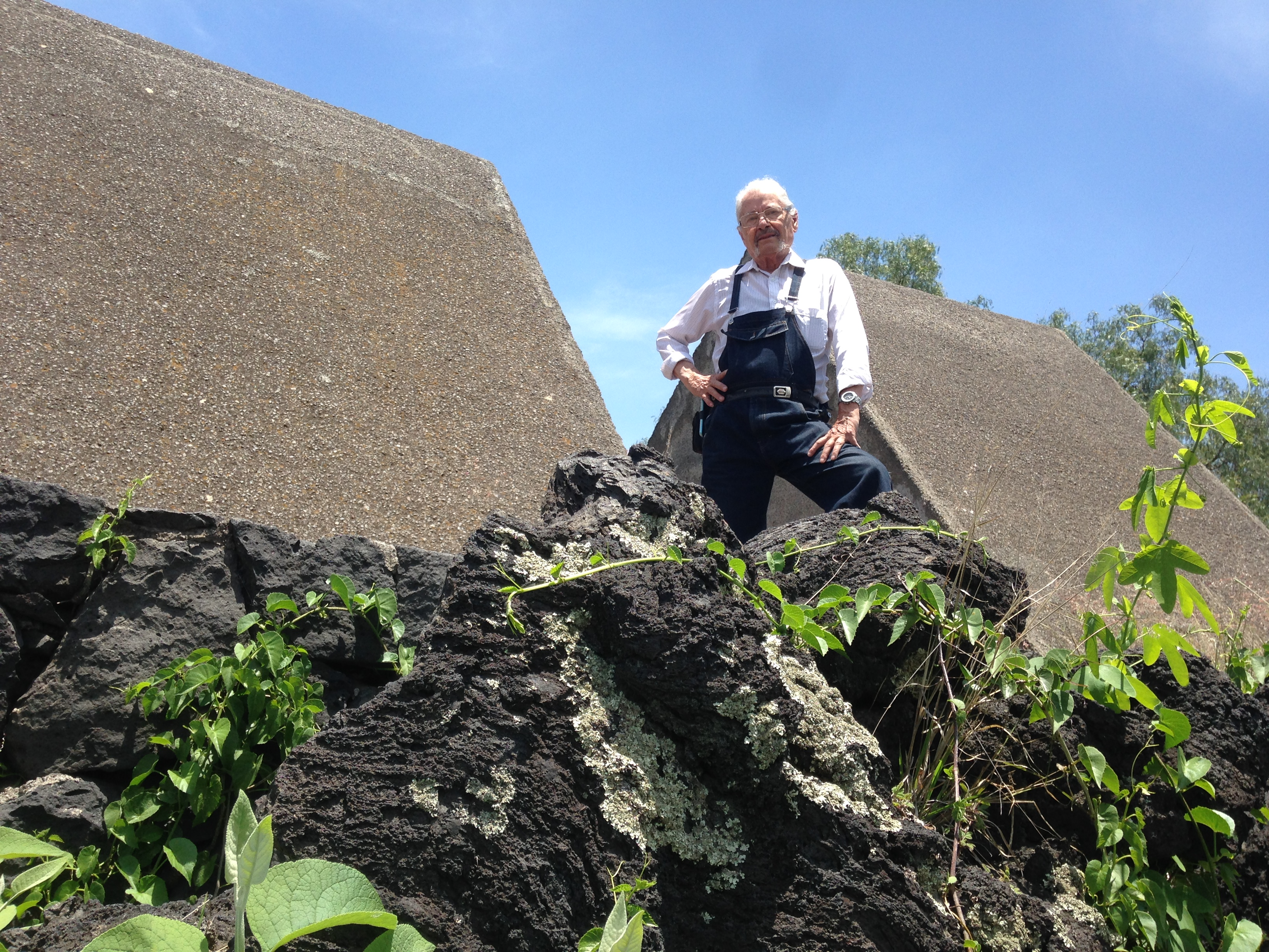 Hersúa dentro del Espacio Escultórico en Ciudad Universitaria (2018)